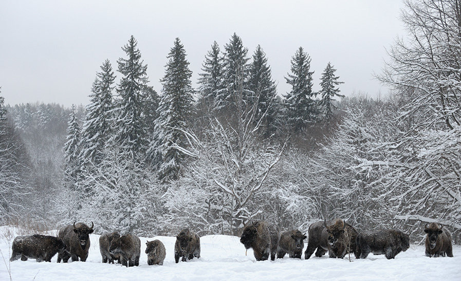 Заповедник "Калужские засеки"